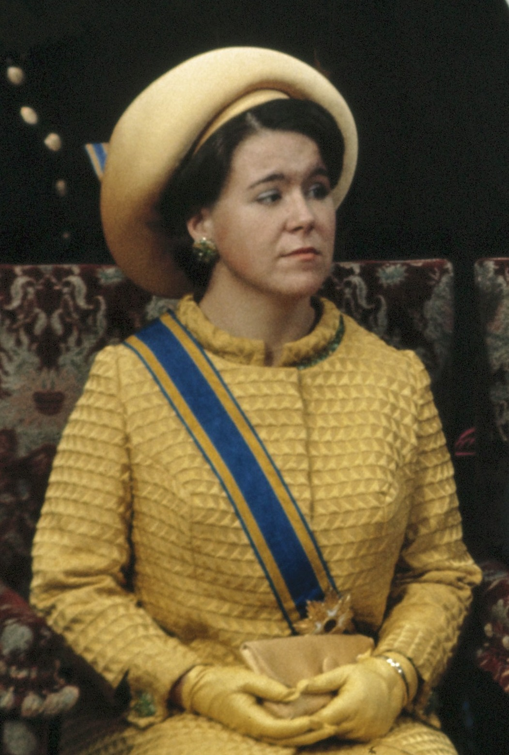 Prinsjesdag: Christina